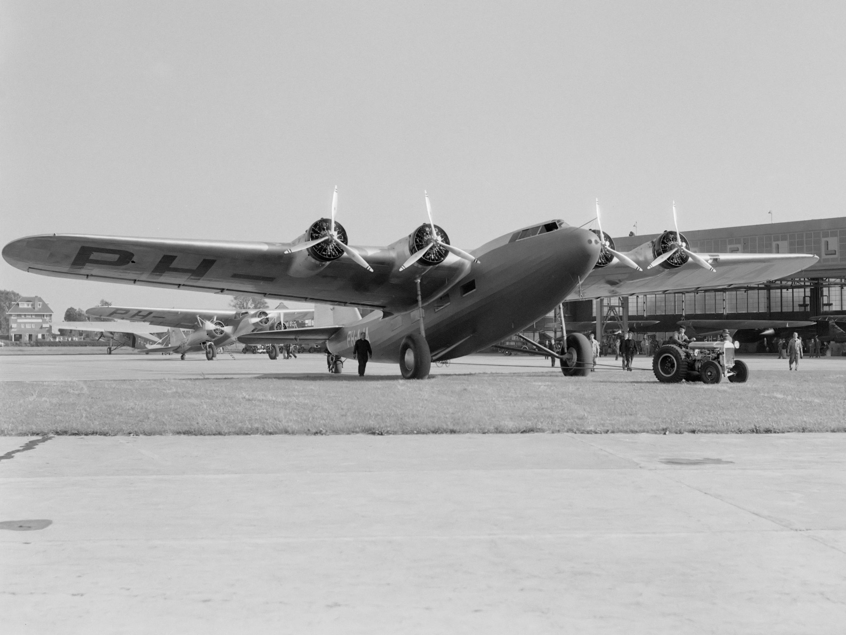 Reportage Schiphol. De "Arend" van Fokker op het platform 1934